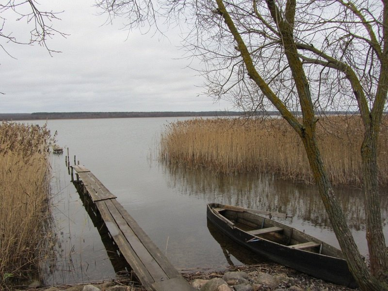 Свір. Возера Свір